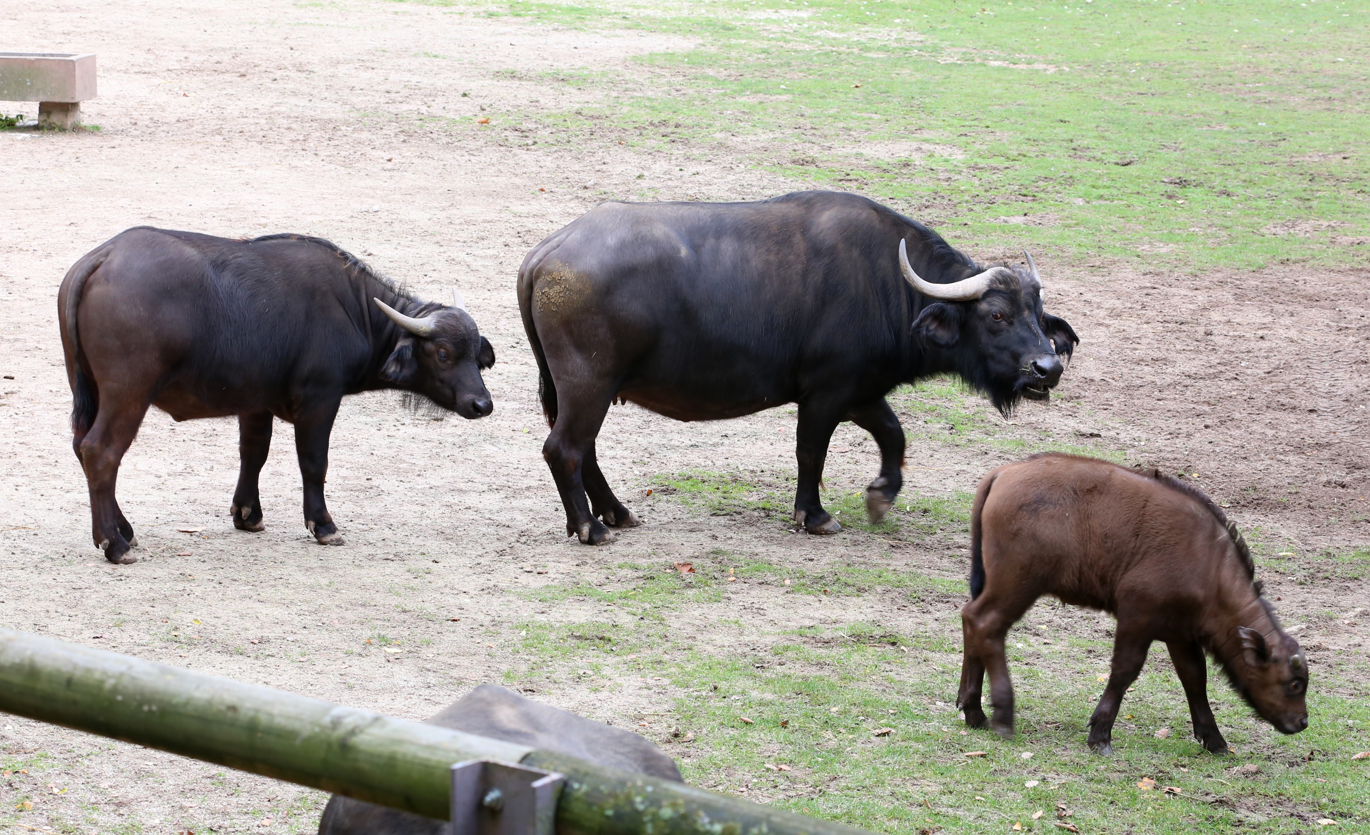 Kaffernbüffel (Syncerus caffer), Tiergarten Nürnberg